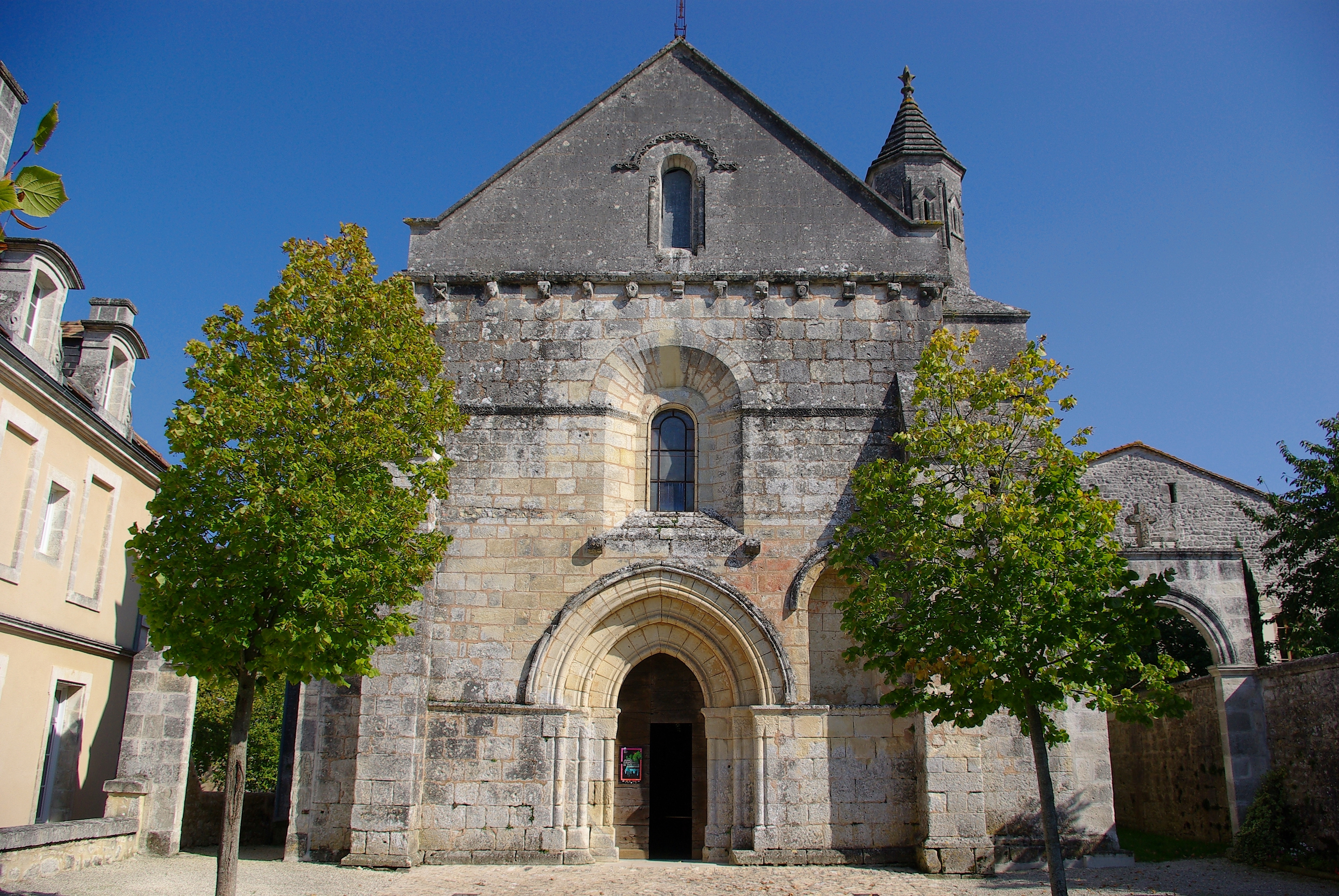 Façade de l'église Saint-Aignan, de Torsac, Charente.